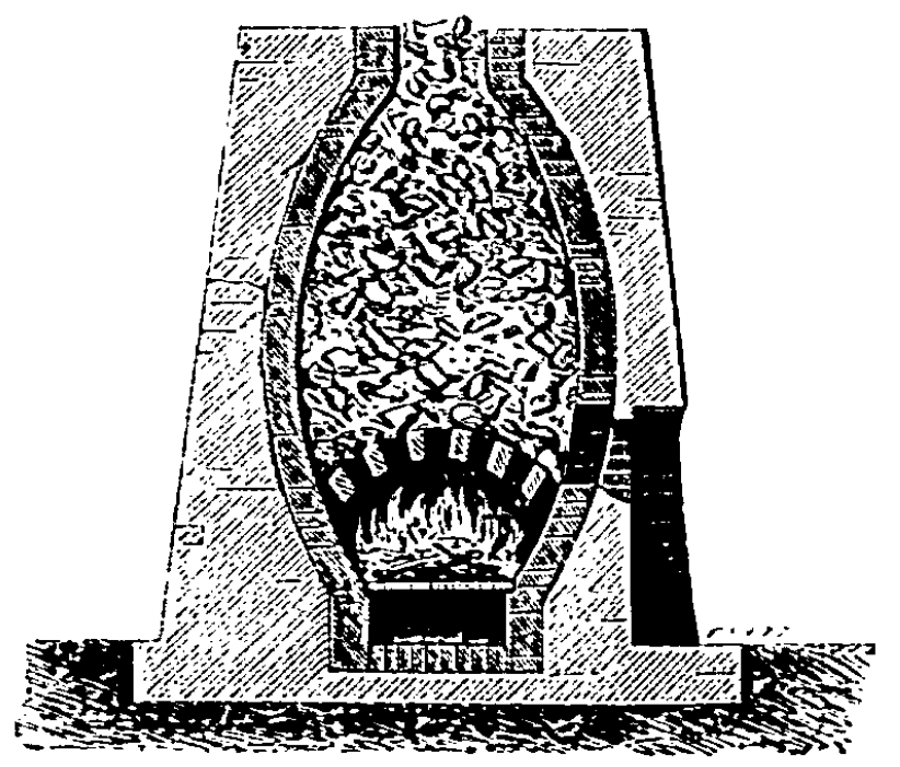 Détail (Figure 67) de la page 116 des Leçons élémentaires de chimie (1897), de Bussard et Dubois - Four à plâtre